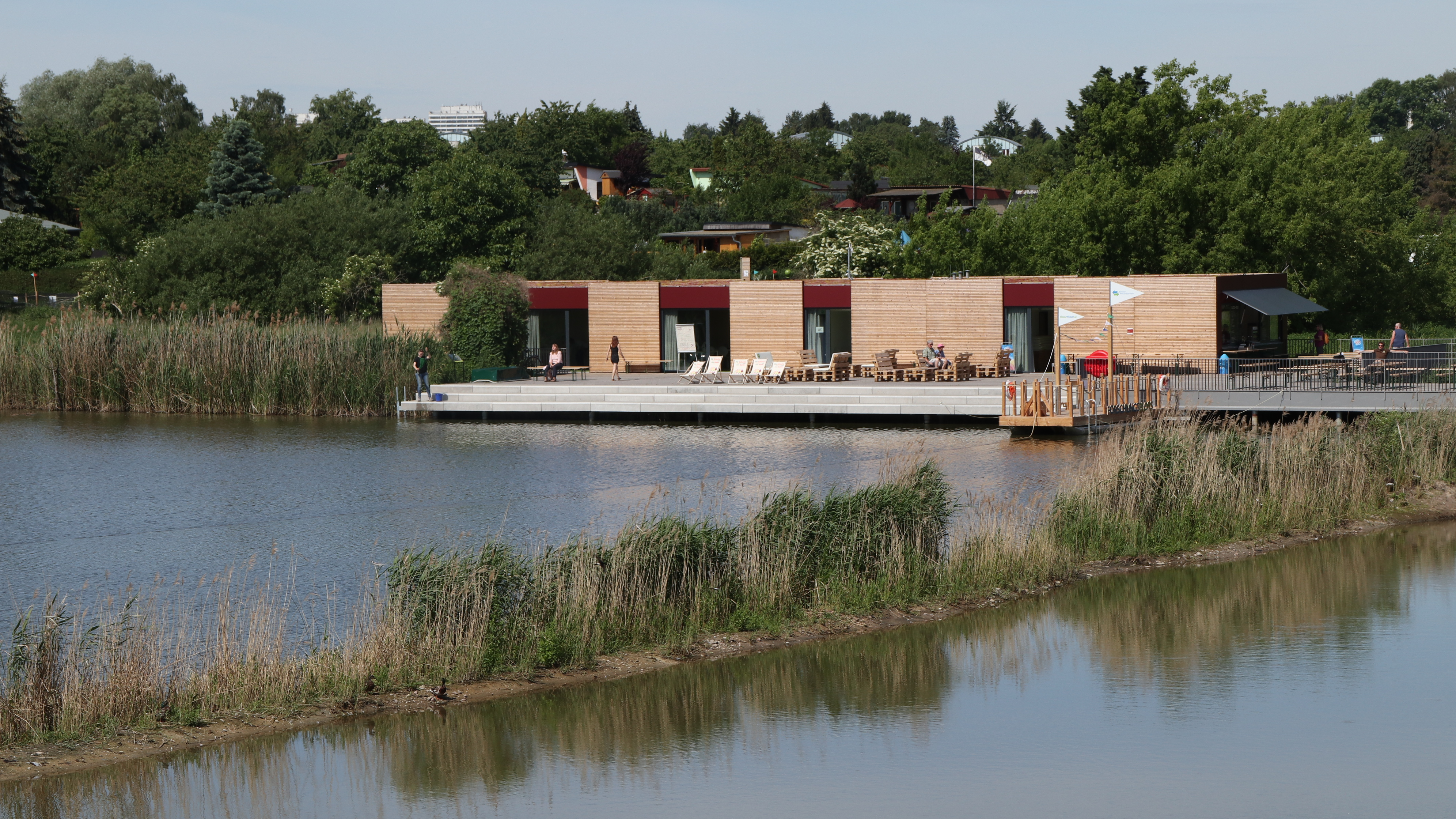 Teich mit Lehr- und Forschungsstation der Berliner Wasserwerke